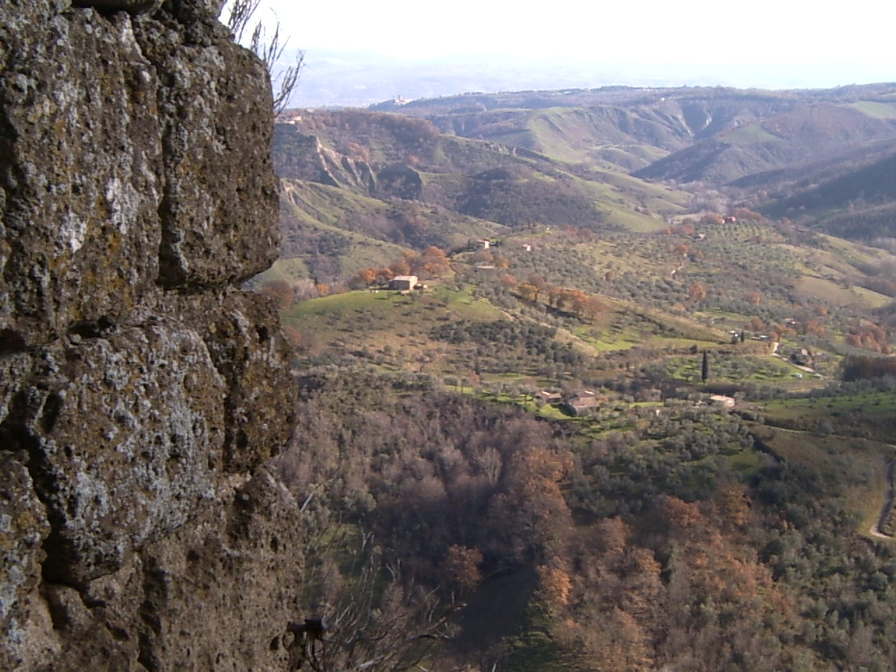 Civita di Bagnoregio, Lazio, ItaliaDa una finestra di Civita di Bagnoregio